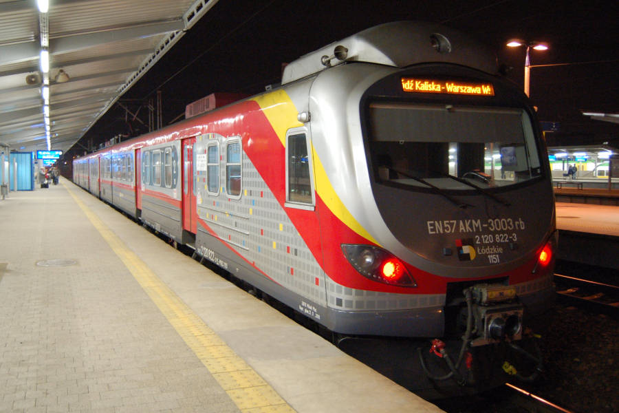 Elektryczny zespół trakcyjny EN57AKM-3003 stoi na stacji Warszawa Wschodnia.